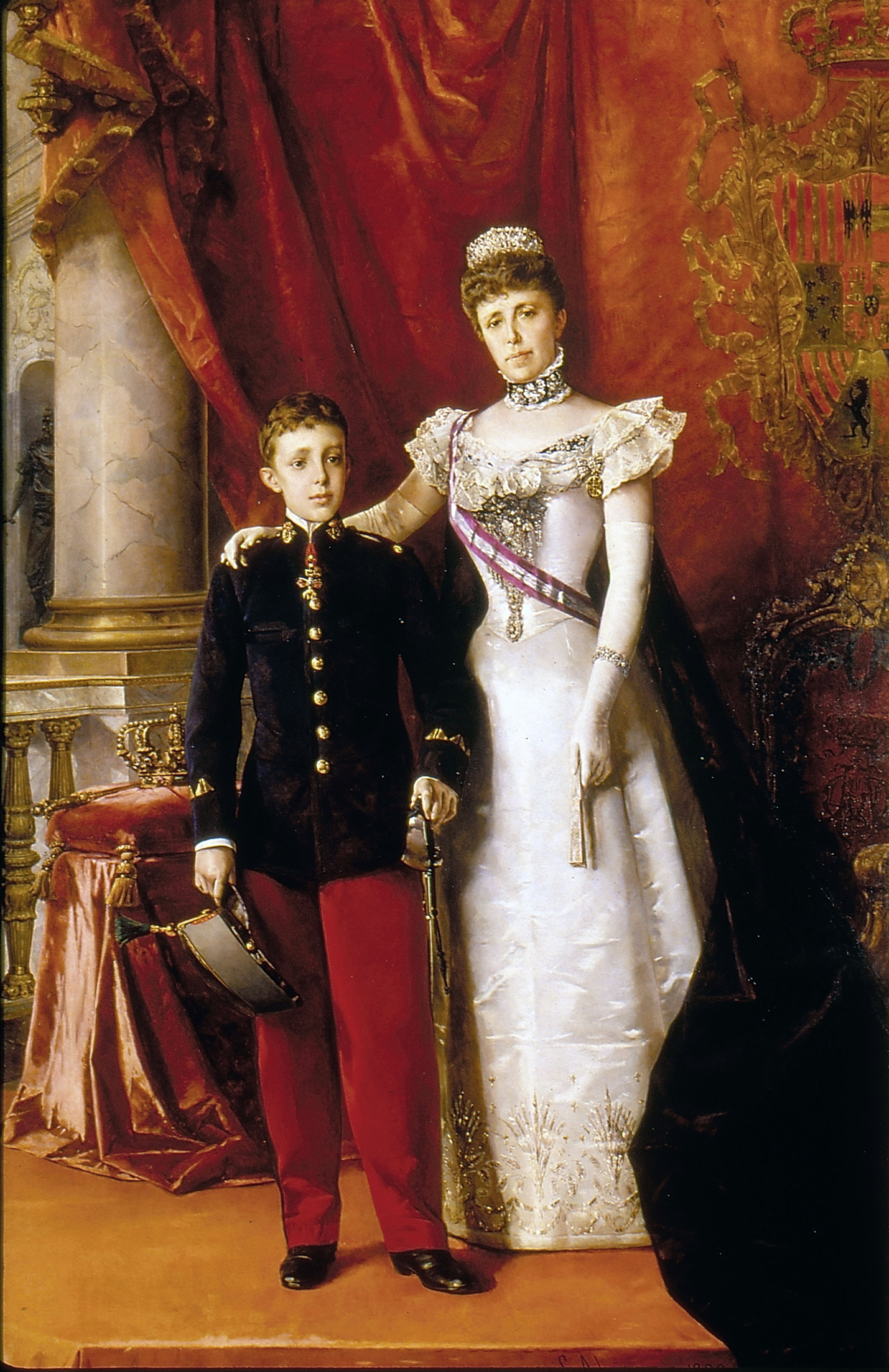 Retrato del rey Alfonso XIII de España (1886-1941) y de su madre, María Cristina de Habsburgo-Lorena (1858-1929), que fue reina regente de España tras la defunción de su esposo, Alfonso XII.